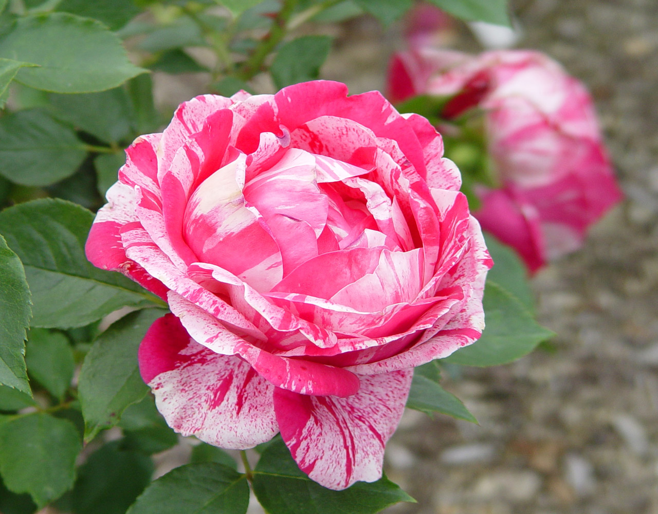 Floribunda フロリバンダ Henri Matisse アンリ マチス France フランス Delbard 1996